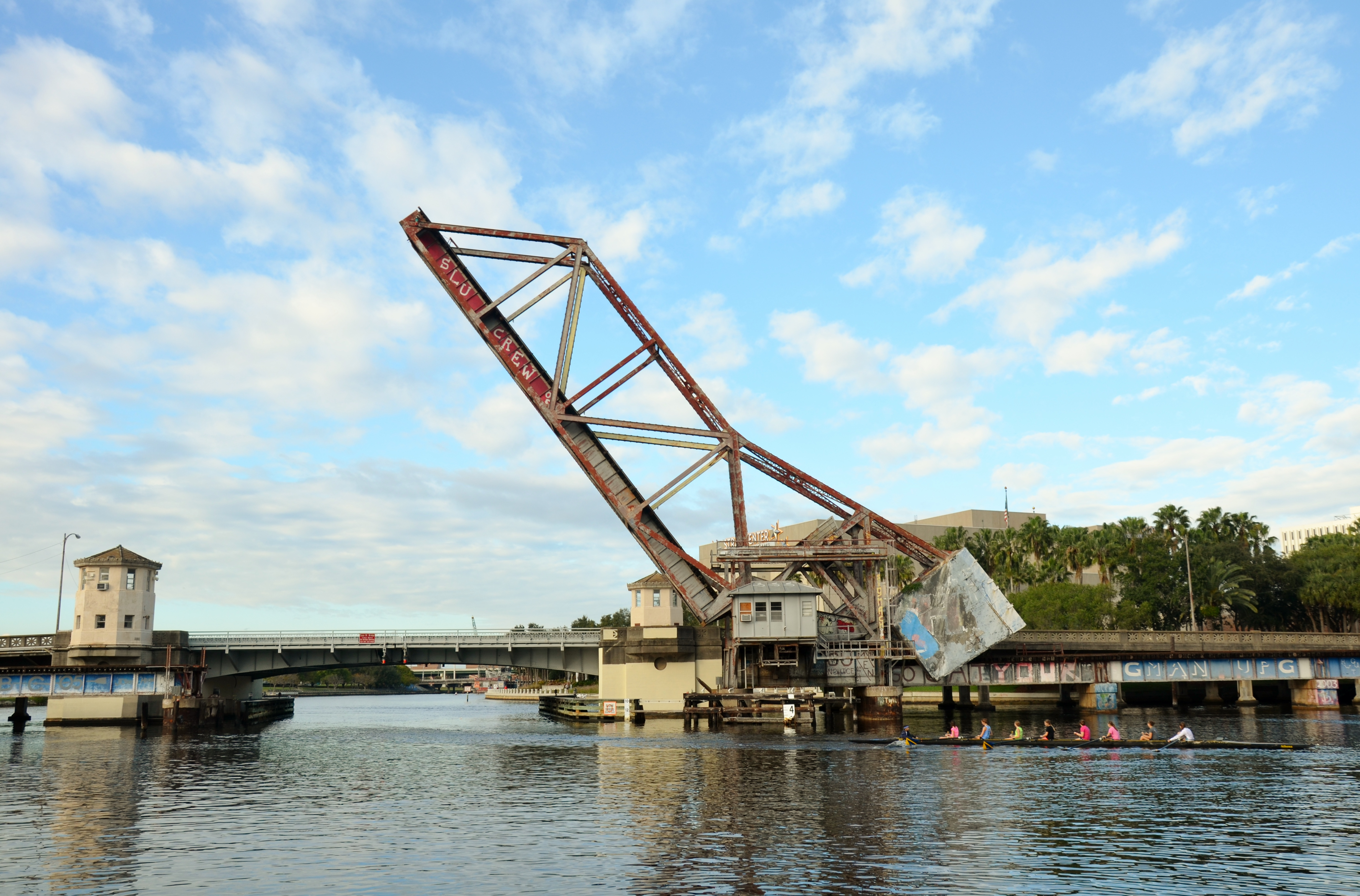 Tampa,Florida,USA.